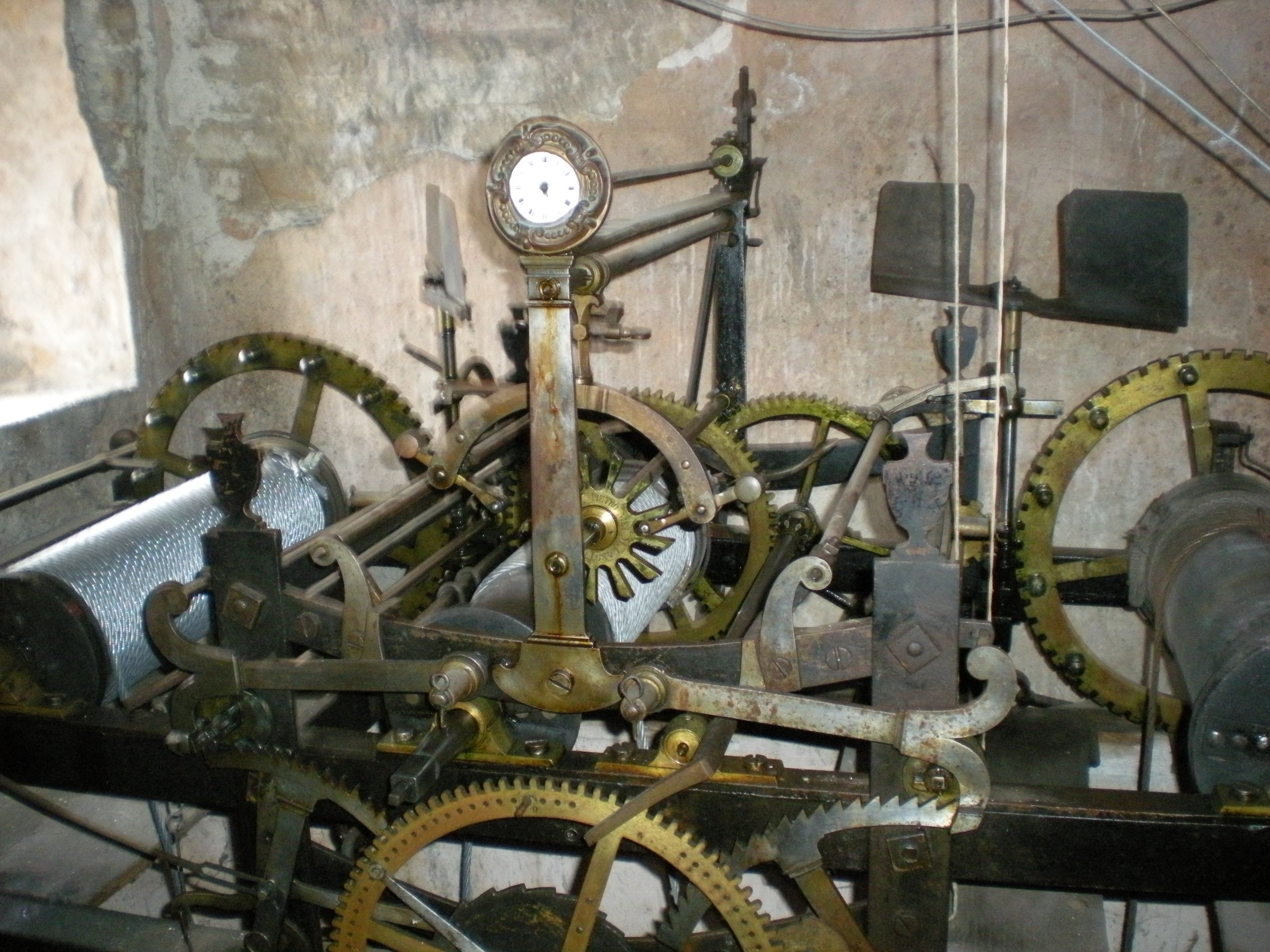 Orologio di Pietro Mei del 1849 del Torrione dell'orologio di Montecarotto .